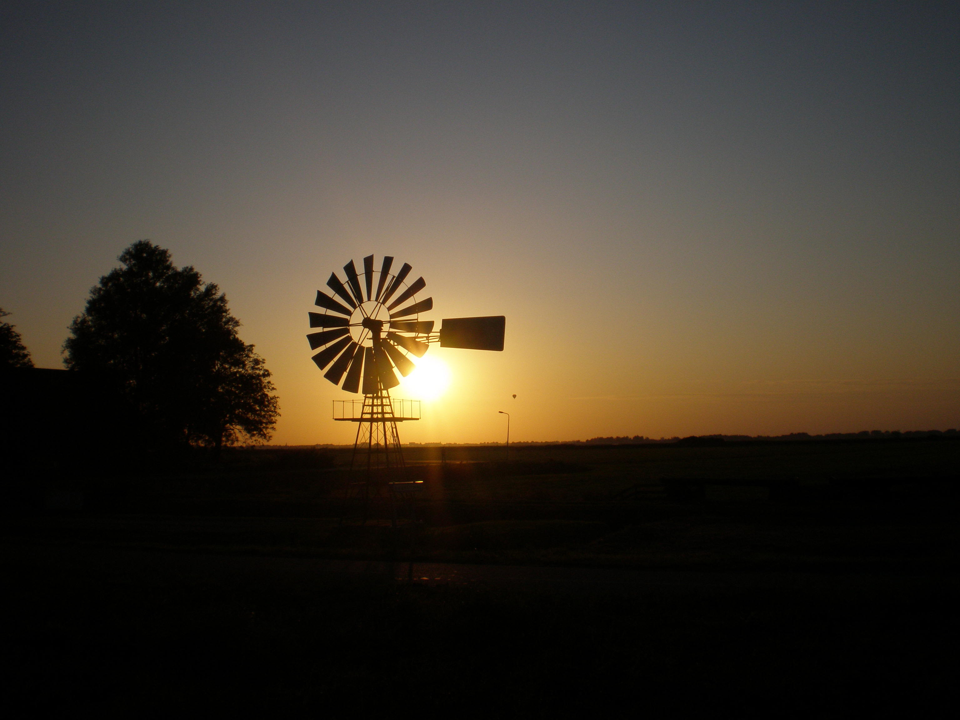 Windmotor Goingarijp